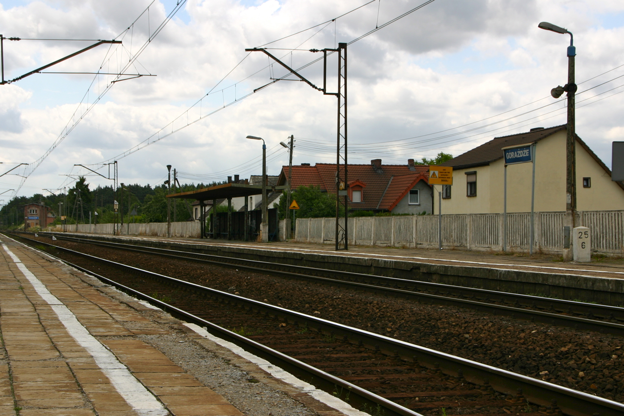 Górażdże (dodatkowa nazwa w j. niem. Goradze, 1935-45 Waldenstein – wieś w Polsce położona w województwie opolskim, w powiecie krapkowickim, w gminie Gogolin.